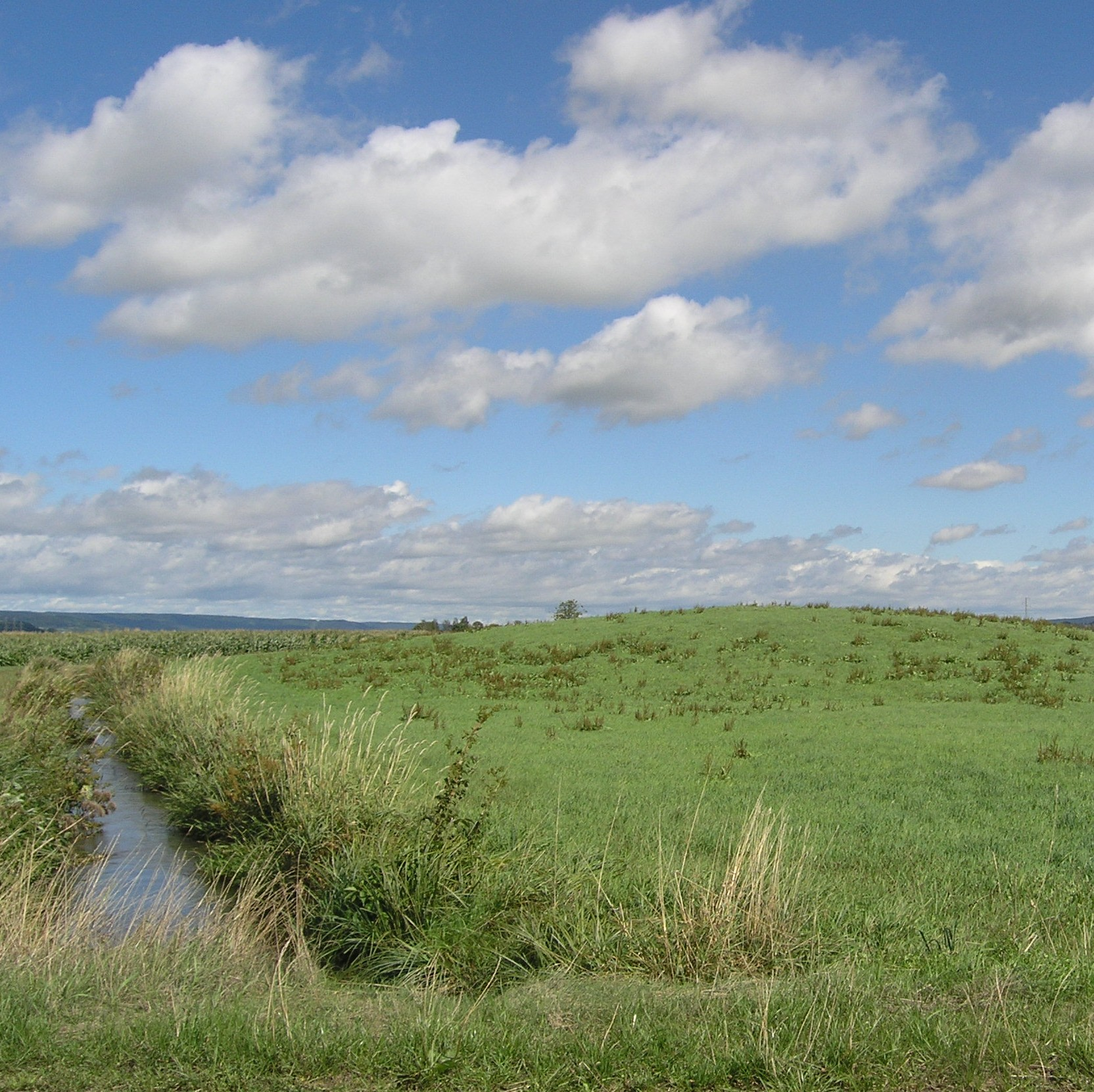 Bettelbühl, frühkeltischer Grabhügel bei Herbertingen, Landkreis Sigmaringen